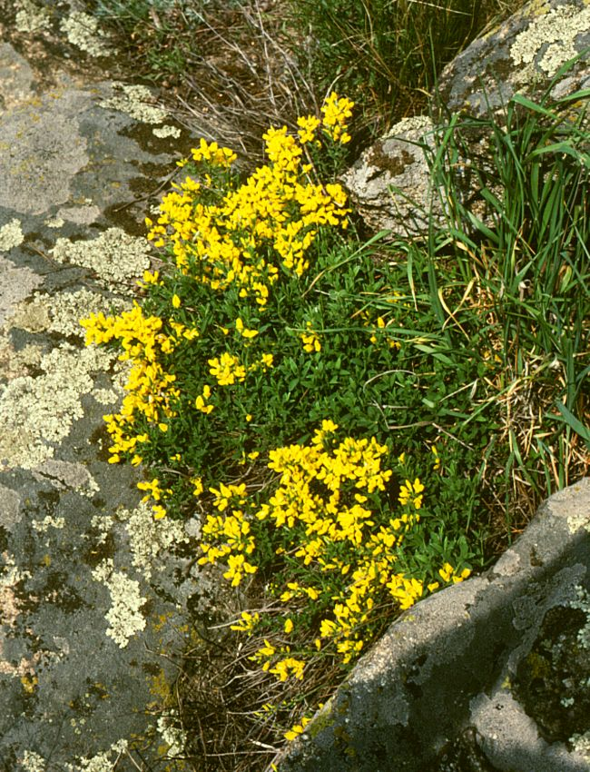 Liege-Geißklee (Cytisus procumbens), Hülsenfrüchtler (Fabaceae), Schmetterlingsblütler (Faboideae) - Österreich/Austria/Autriche: Niederösterreich, Ostrand des Waldviertels, „Kogelstein“ NNE Grafenberg bei Eggenburg